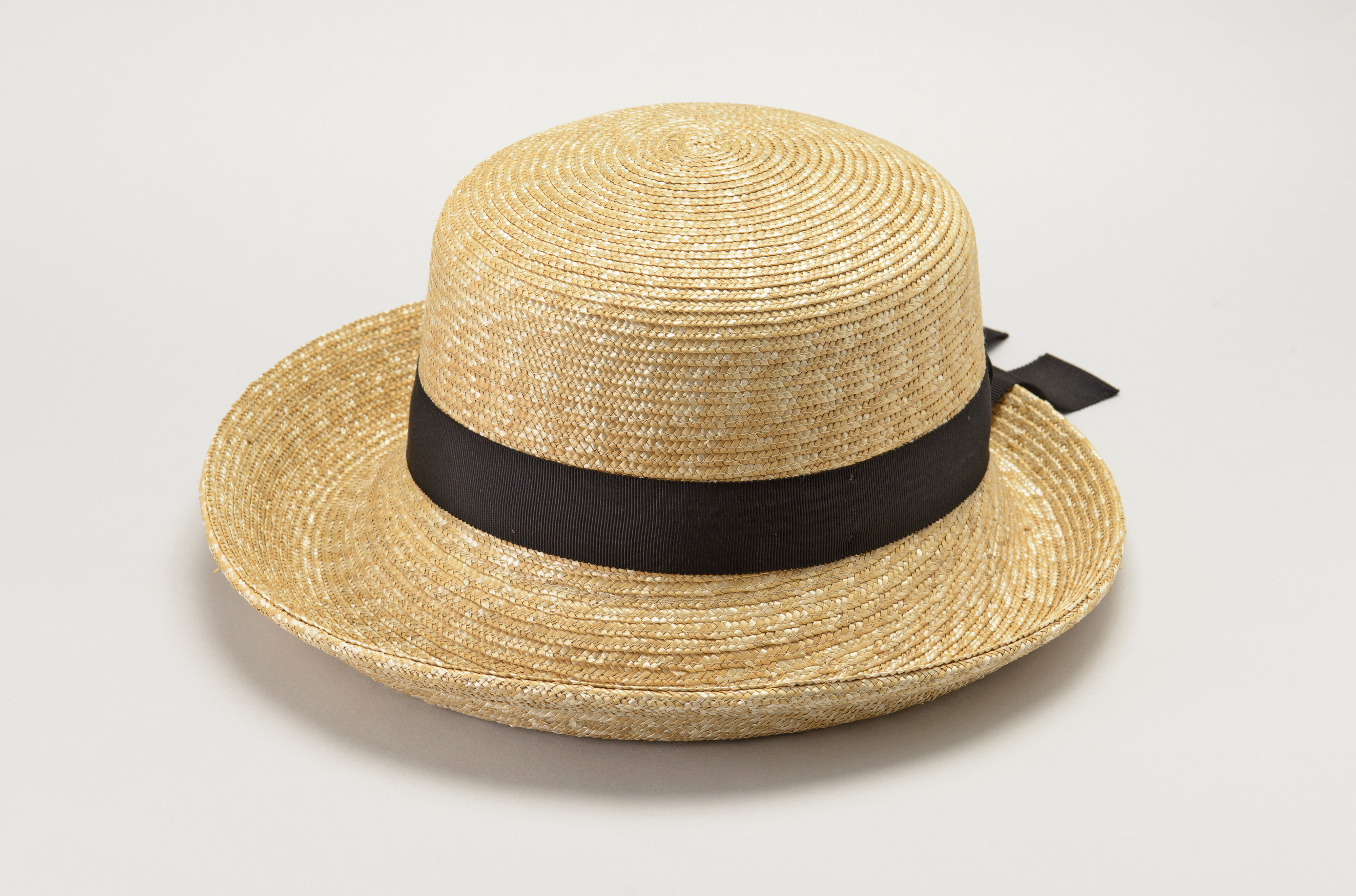 女性用麦わら帽子